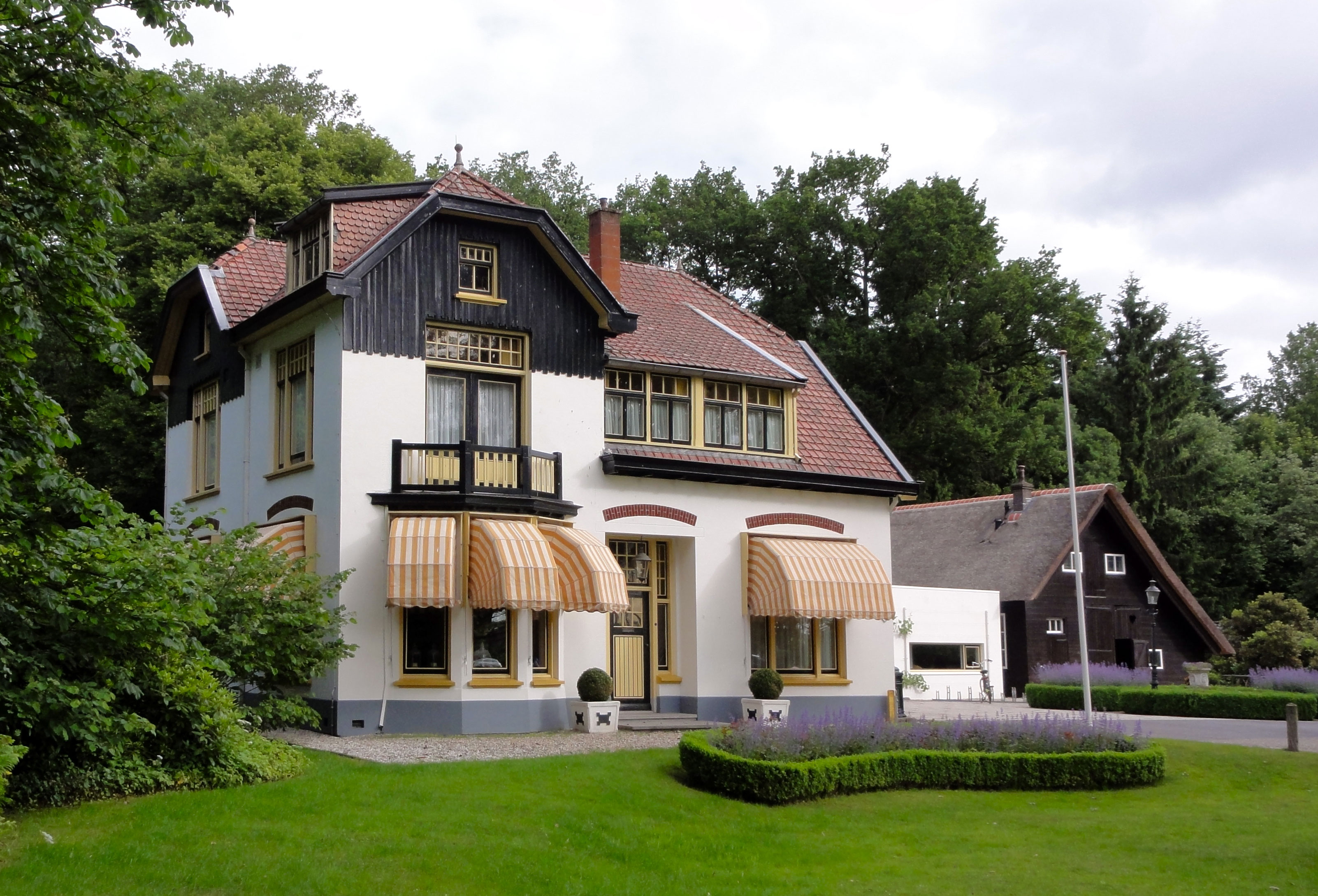 Dokterswoning - Maatschappij van Weldadigheid - Majoor van Swietenlaan 2 Frederiksoord - rijksmonument